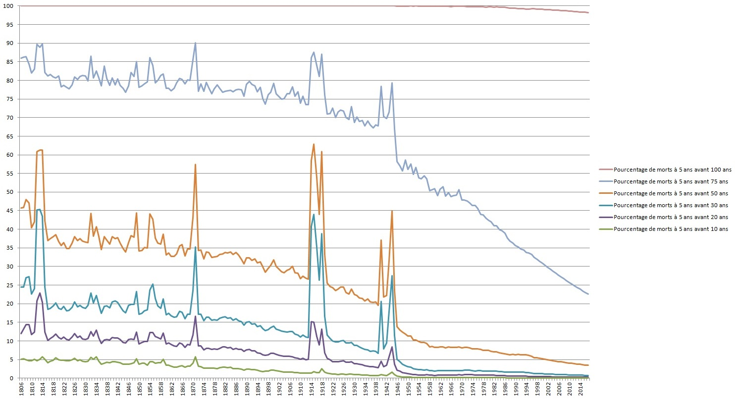 Évolution du pourcentage de la population, ayant survécu au moins 5 ans, mort avant d'avoir atteint un âge donné (10 ans, 20 ans, 30 ans, 50 ans, 75 ans, 100 ans) de 1806 à 2017 (Source: INED)